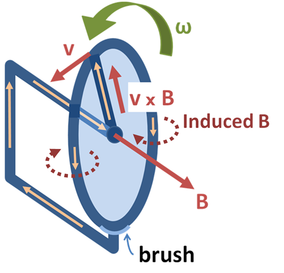 Faraday's disc generator